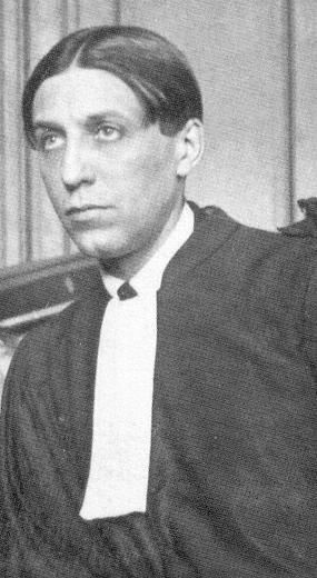 photo de Maitre Maurice Garçon.Archives personnelles